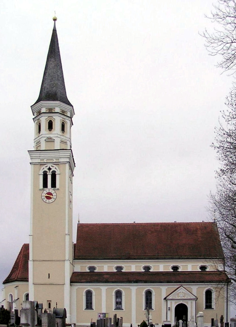 Pfarrkirche St. Benedikt in Odelzhasuen (vom Friedhof aus gesehen).